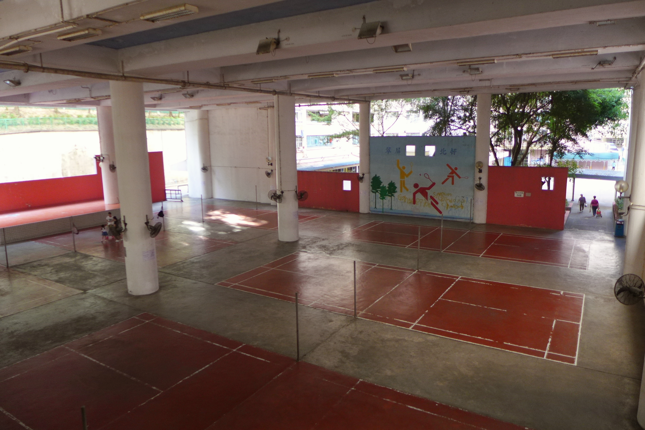 Tsui Ping North Estate Indoor Badminton Court